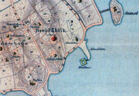 Villa Alphyddan på en karta Djursholms villastad 1896